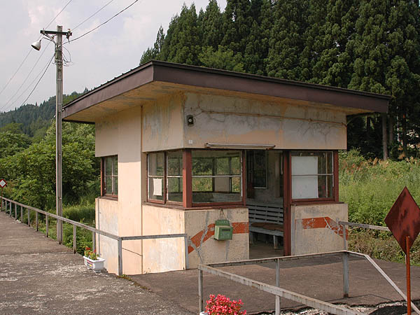 Kayakusa Station, on the Akita Nairiku Jūkan Railway Akita Nairiku Line, Akitaakita, Akita, Japan